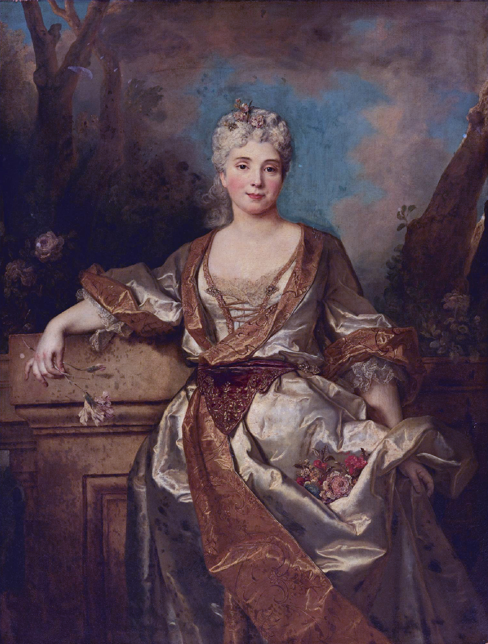 Jeanne-Henriette de Fourcy, Marquise de Puységur (1692-1737) Ce tableau de 1726, n'a jamais été celui de Jeanne Henriette de Fourcy mais celui de Jaquette de Pages de Beaufort, Comtesse de Puysegur. Il s'agit probablement d'un cadeau de Mariage. Ce tableau forme une paire avec celui de son époux Pierre-Hercule de Chastenet Comte de Puysegur qui est actuellement au Hillwood museum à Washington